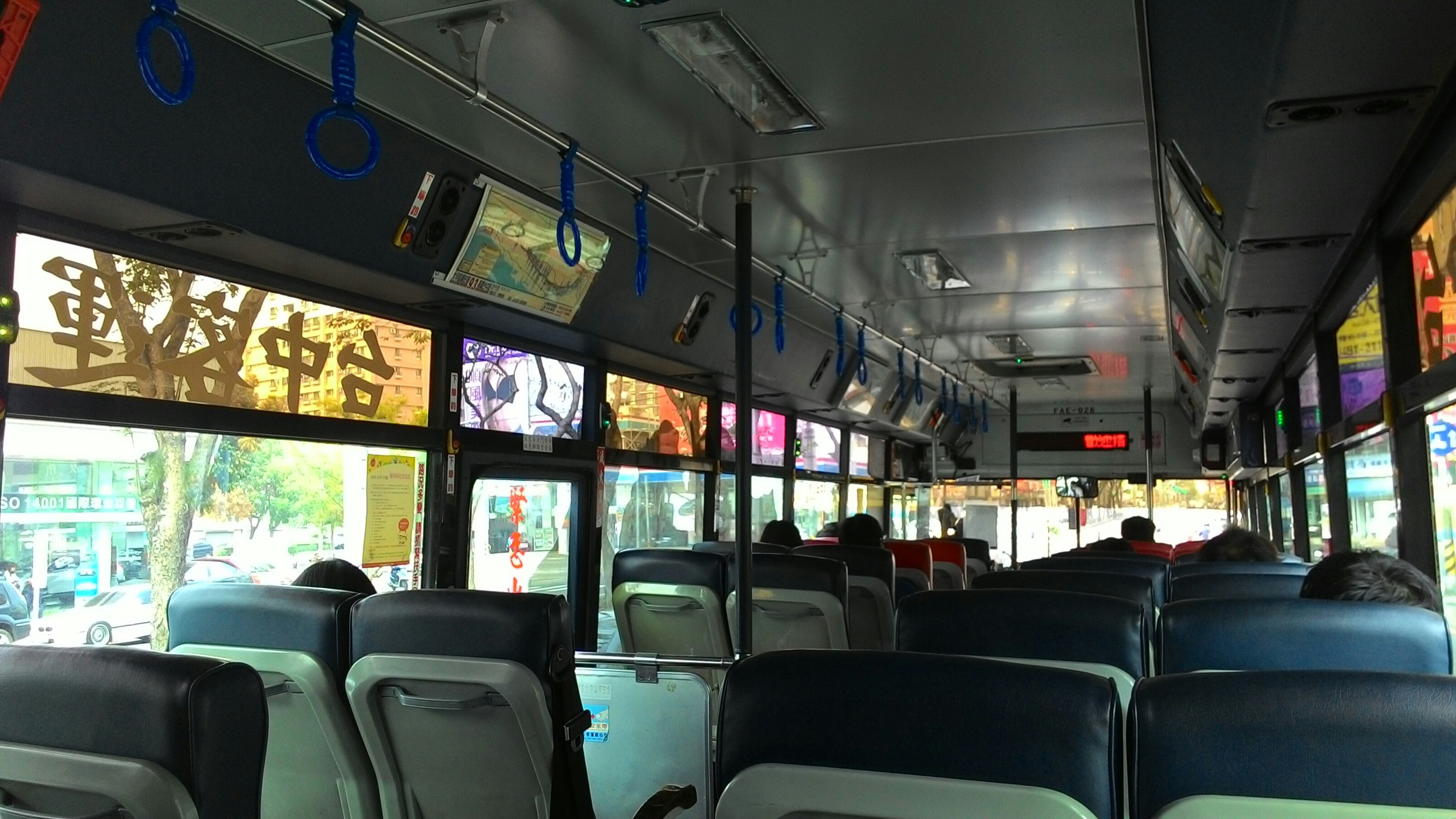 中文（台灣）: 2006〈2012〉 HINO ERK1JRL（馨盛）